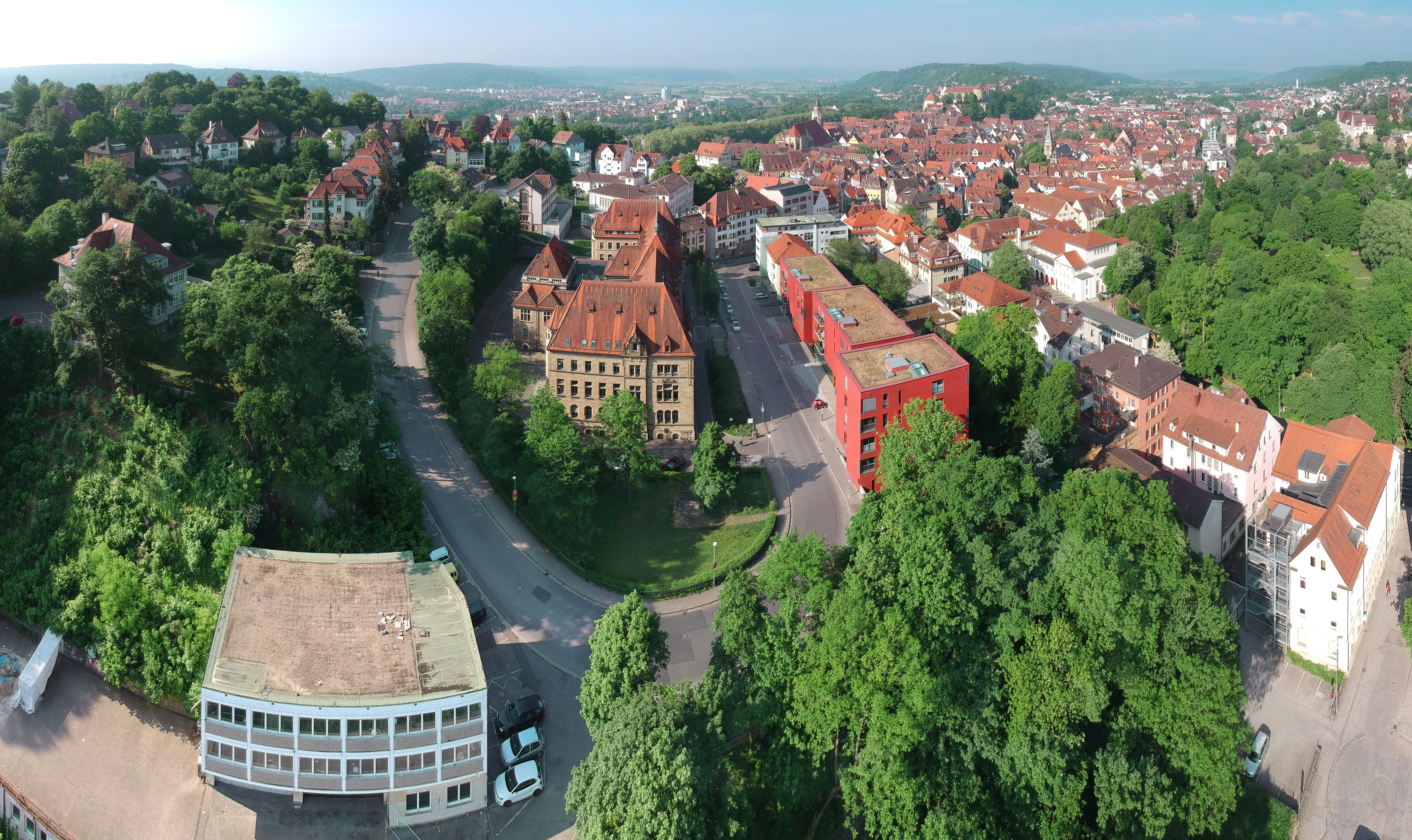 Doblerstraße in Tübingen aus der Luft